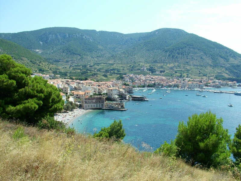 Port Komiza na wyspie Vis